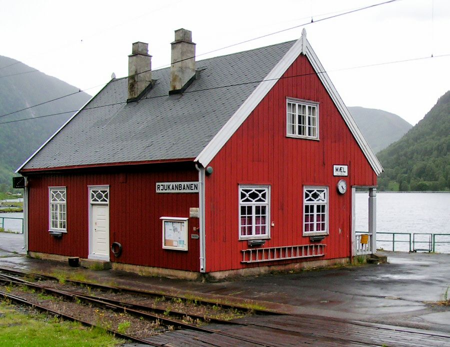 station building Mæl, Norway, Rjukanbanen